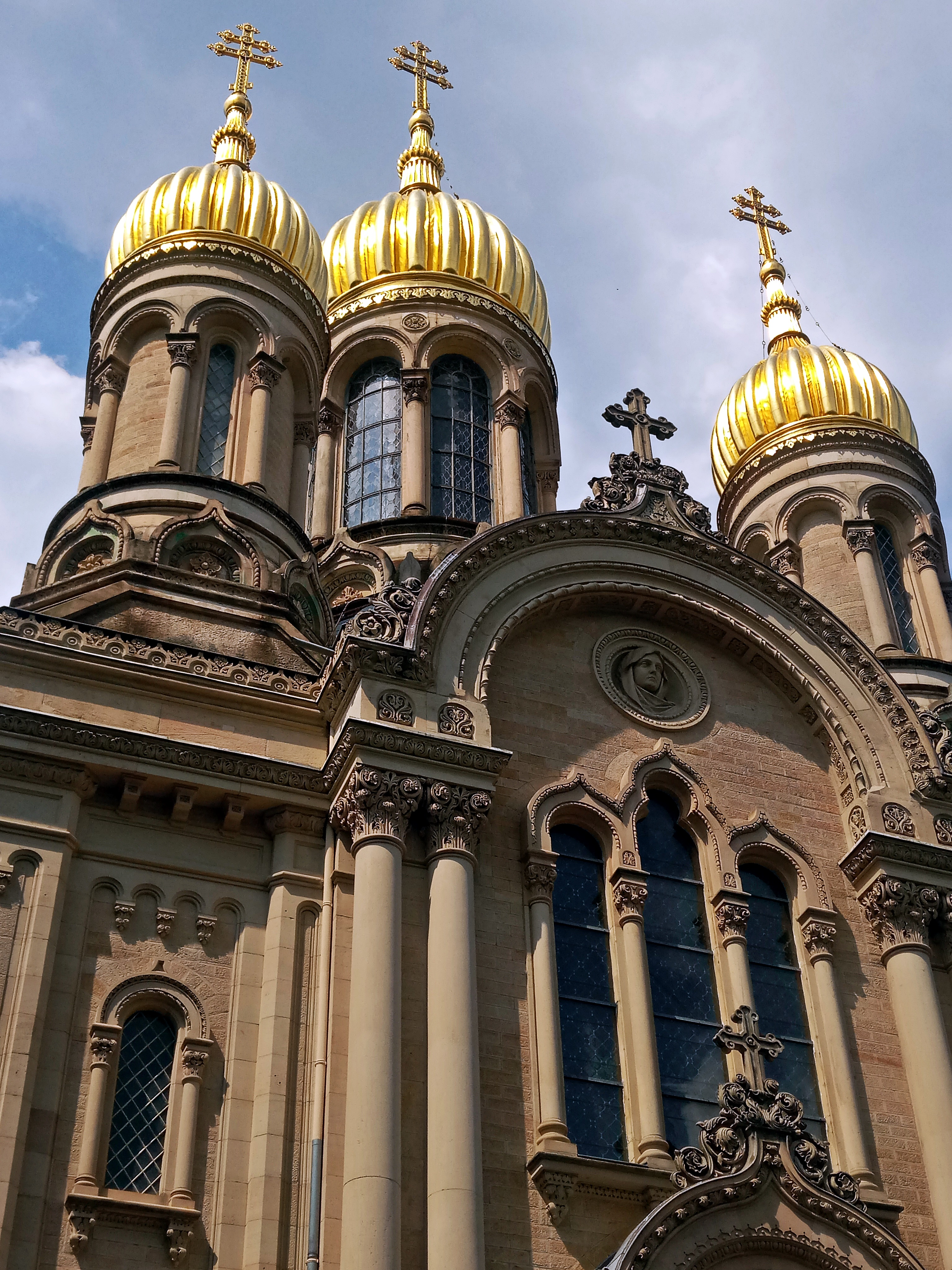 Russische Kirche Wiesbaden, Kuppeln von Süden